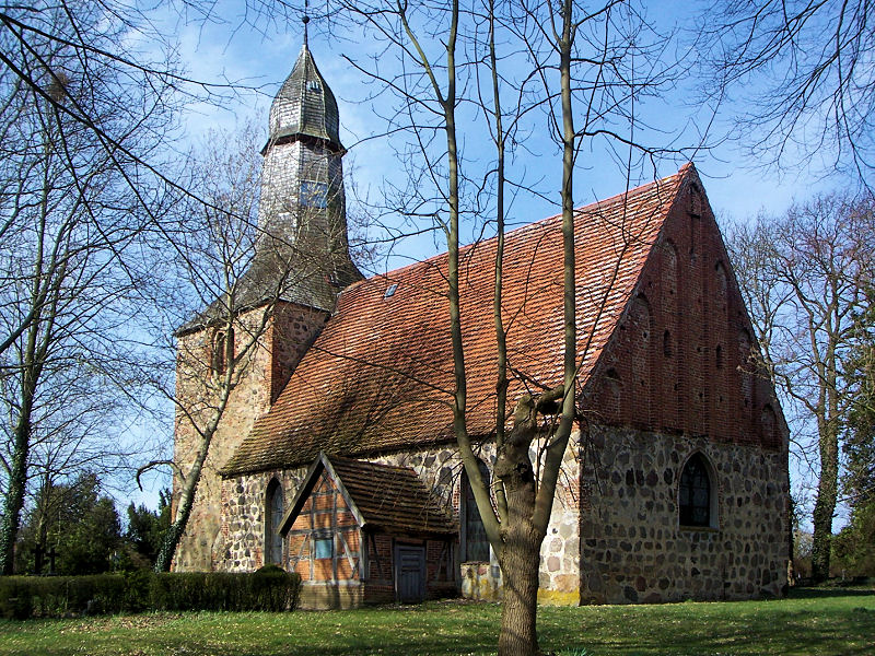 Kirche in Kladrum, Landkreis Parchim